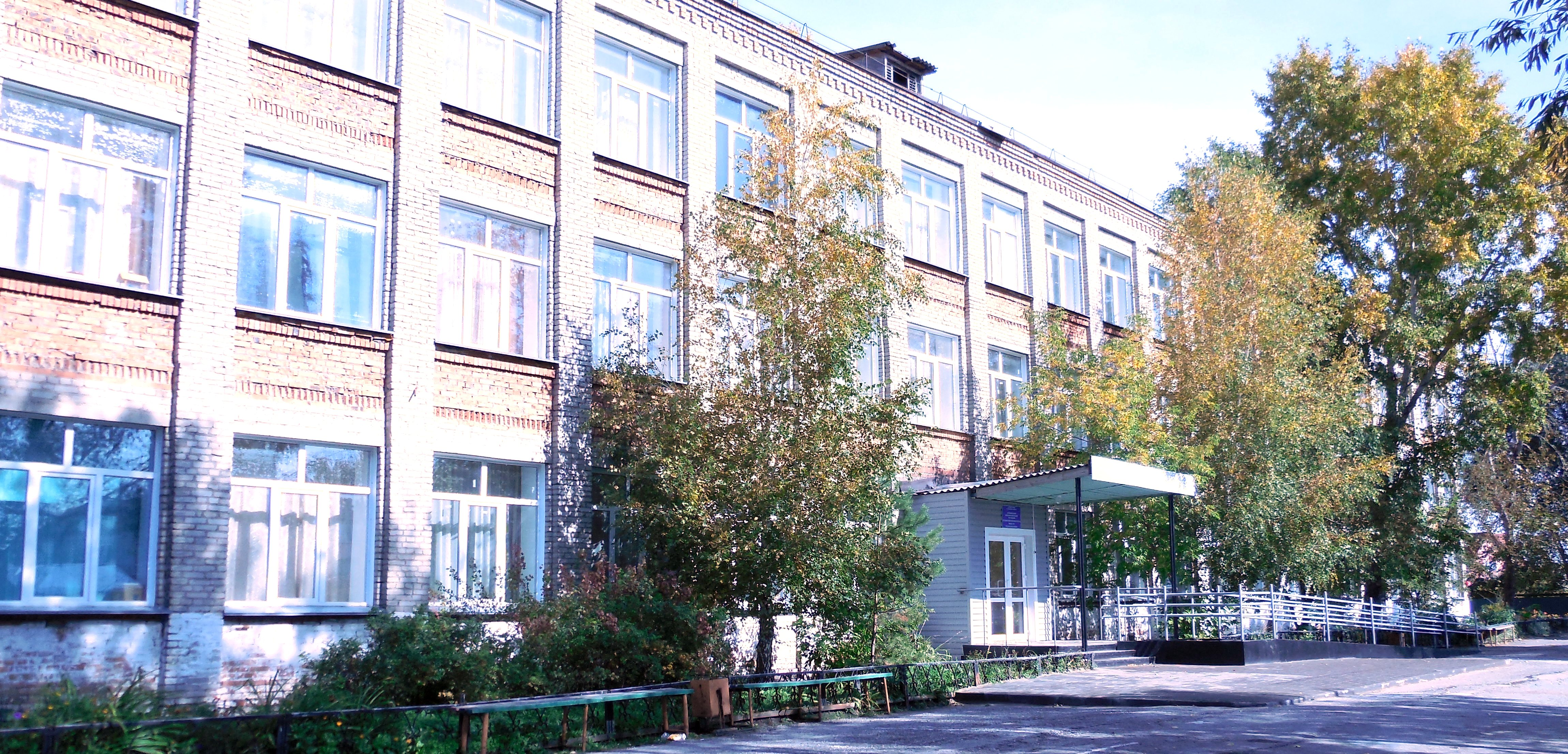 МКОУ СОШ № 1